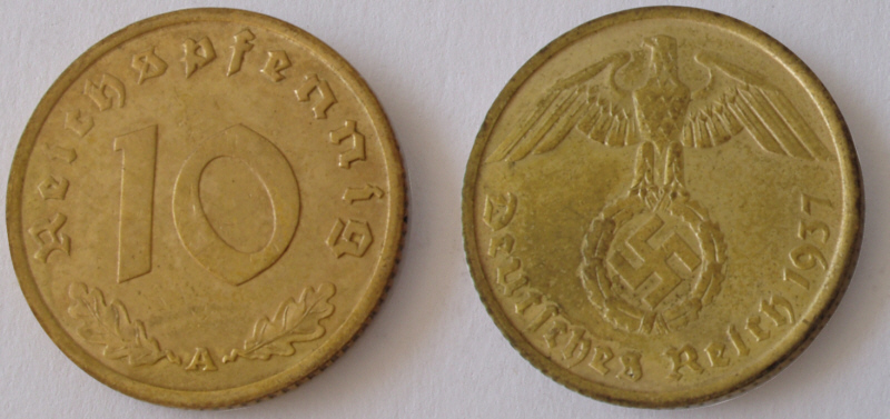 Deutsches Reich, 10 Reichspfennig, 1937, d=21 mm, 4 gramm, cu/al 915/85